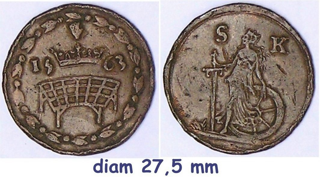 Gildepenning leren broekenmakers, Antwerpen 1563. Foto van eigen exemplaar